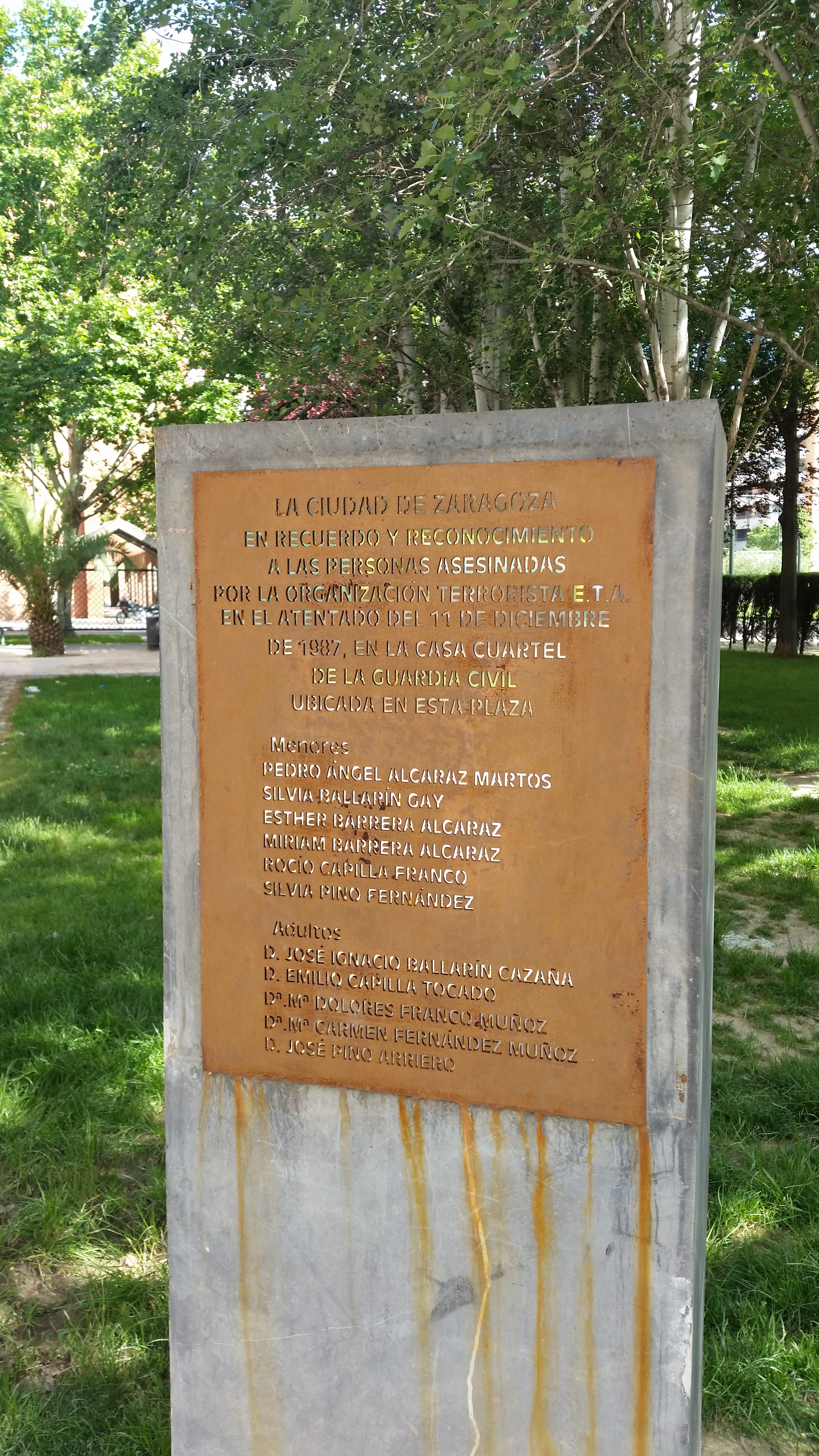 Zaragoza - Parque de la esperanza - Monumento a los niños (1991) de Carlos Pérez de Albéniz Navarro - En homenaje a los asesinados por ETA en el atentado del 11 de diciembre de 1987 contra la casa cuartel que se encontraba en el solar que ocupa ahora el parque - Placa con los nombres de las víctimas